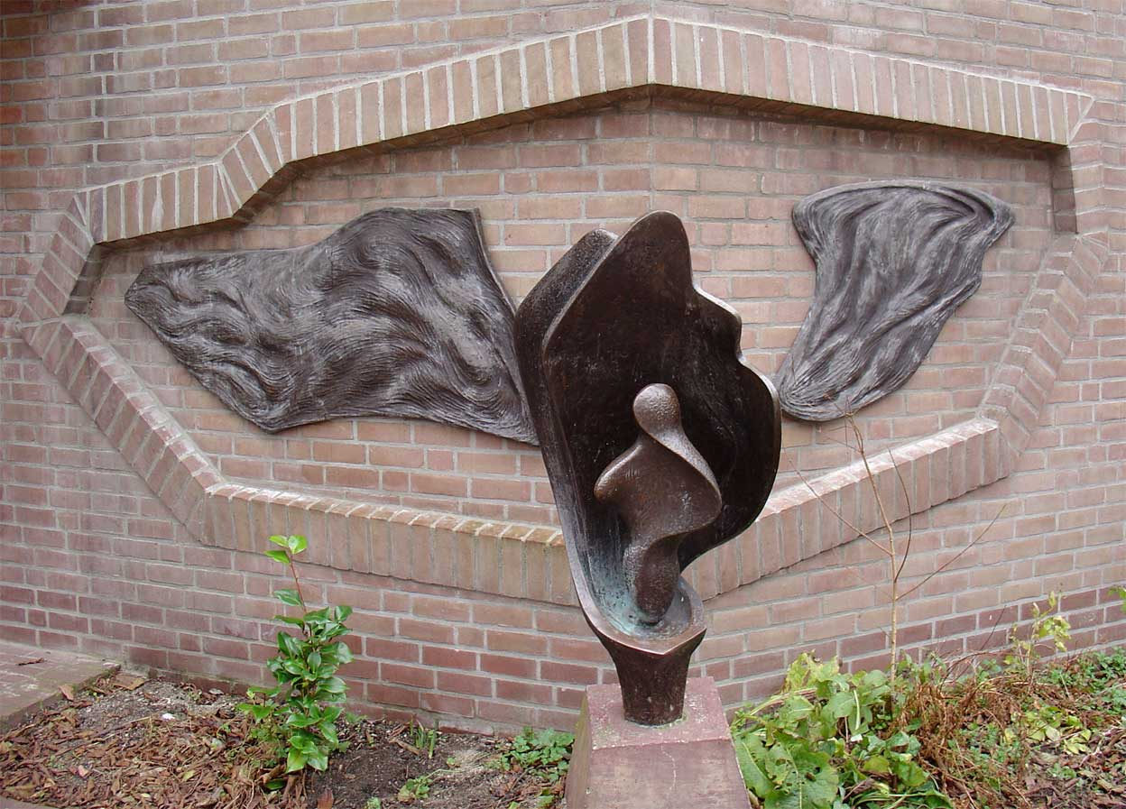 Denken, voelen, willen (brons, deels reliëf, 1983) door Doorlie Gerdes - Ridder van Catsweg Gouda